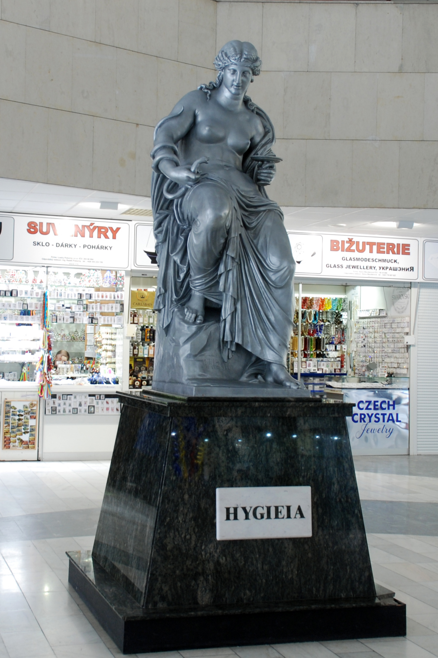 Socha Hygie ve Vřídelní kolonádě v Karlových Varech